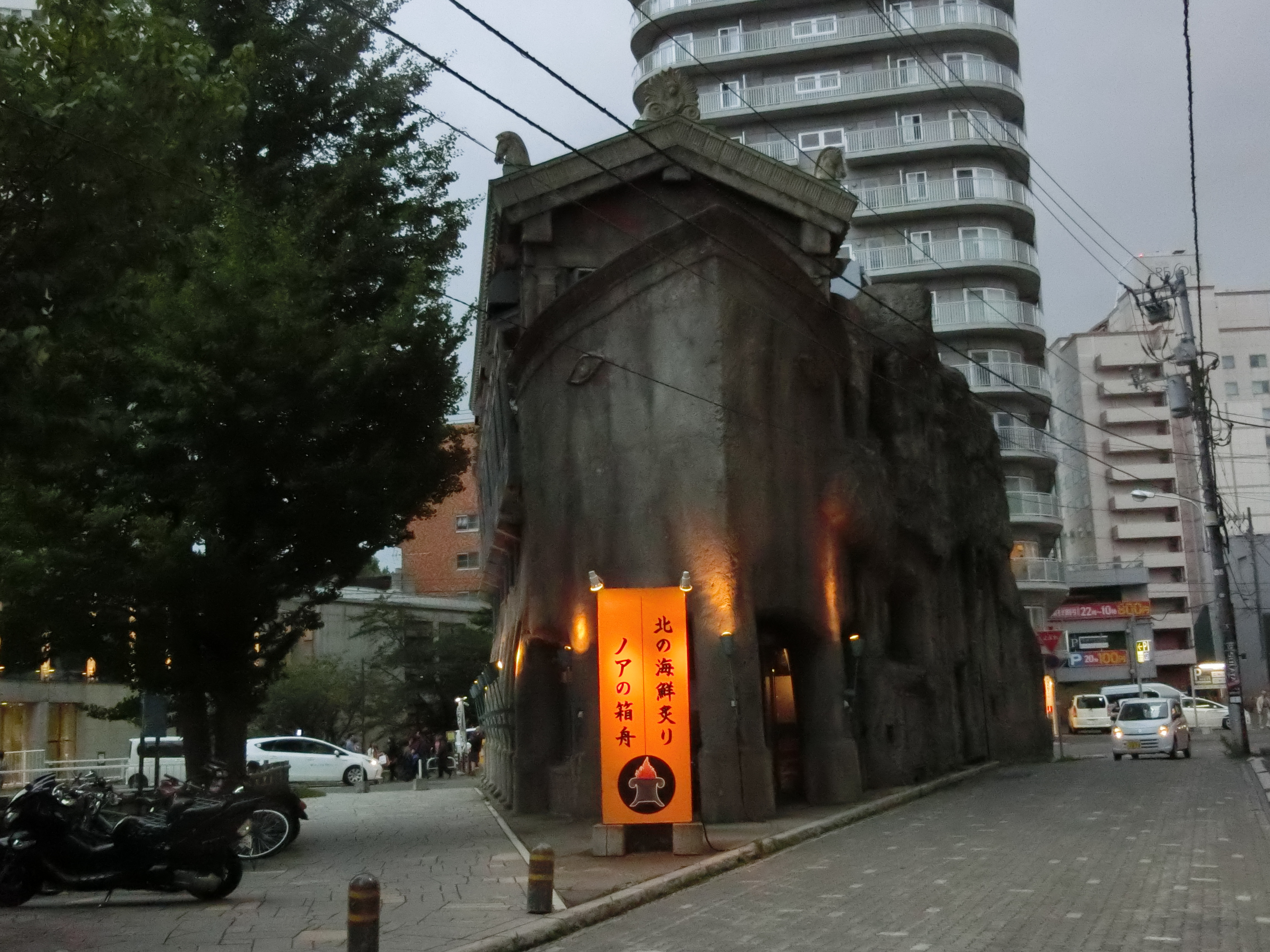 札幌市中央区の中島公園近くにあるすすきのノアの箱船